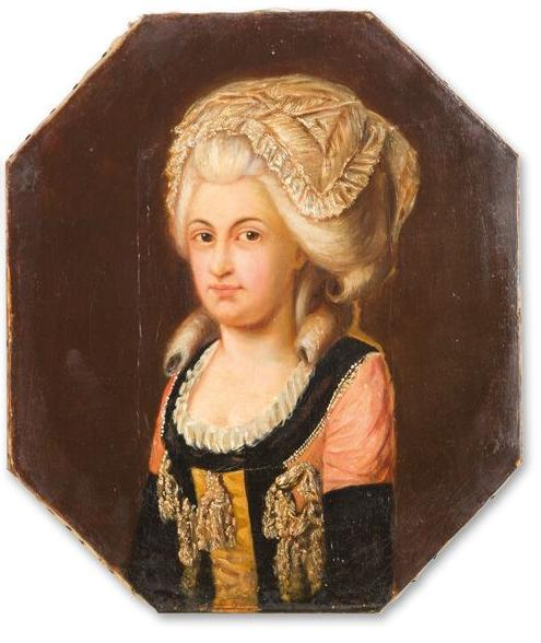 Portrai von "Wilhelmine Johanna Gräfin von Schwerin geb. Freiin von Rehbinder" (1766-1829)